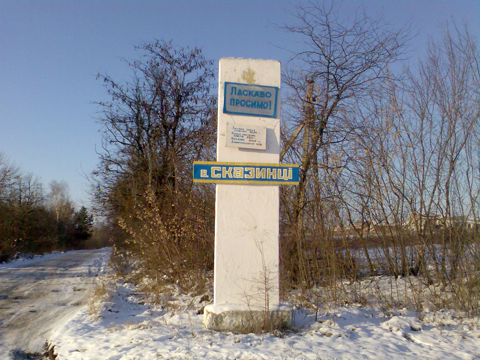 в'їзд до села Сказинці